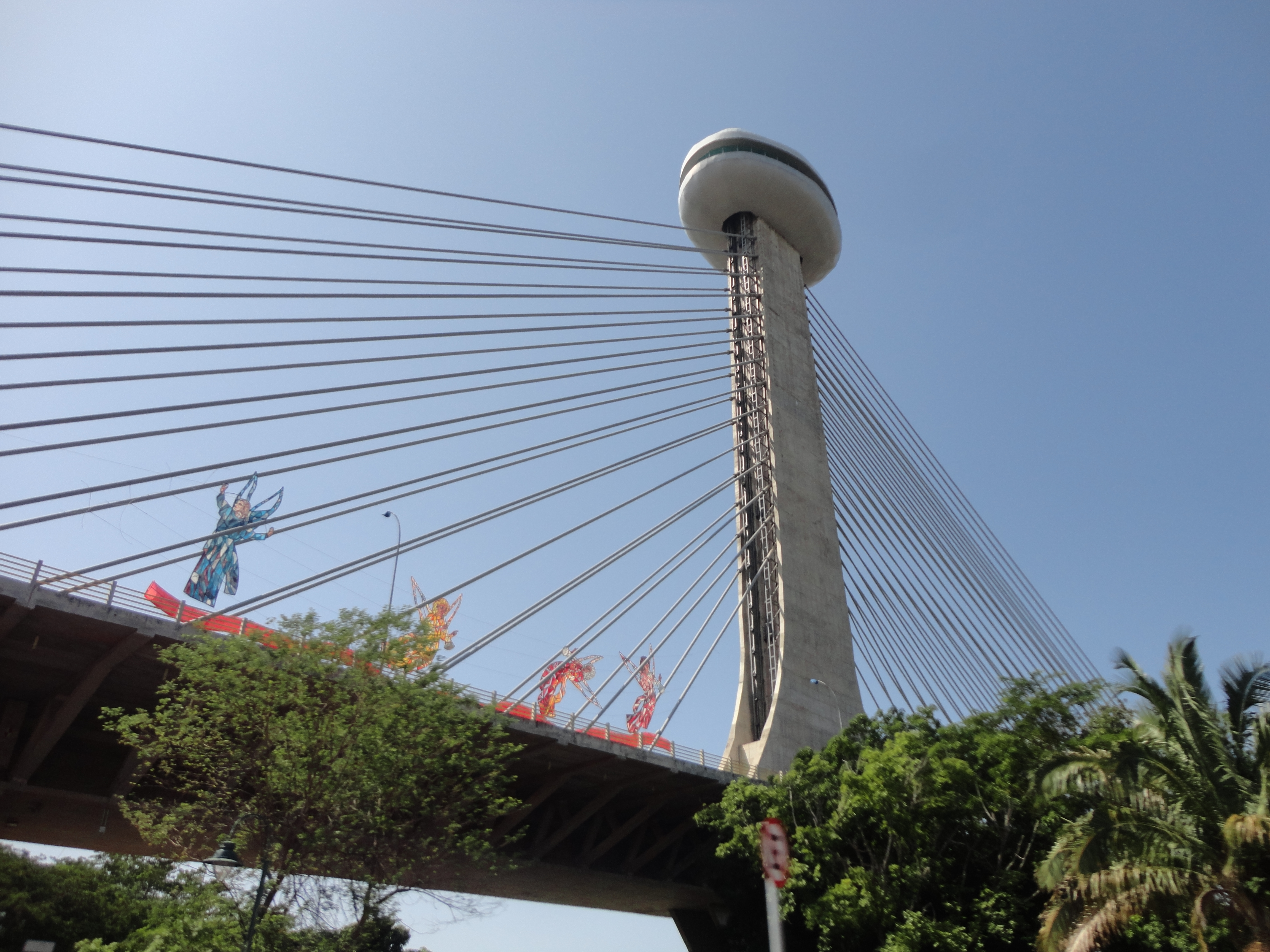 Um ponto turístico de Teresina-PI(Brasil).